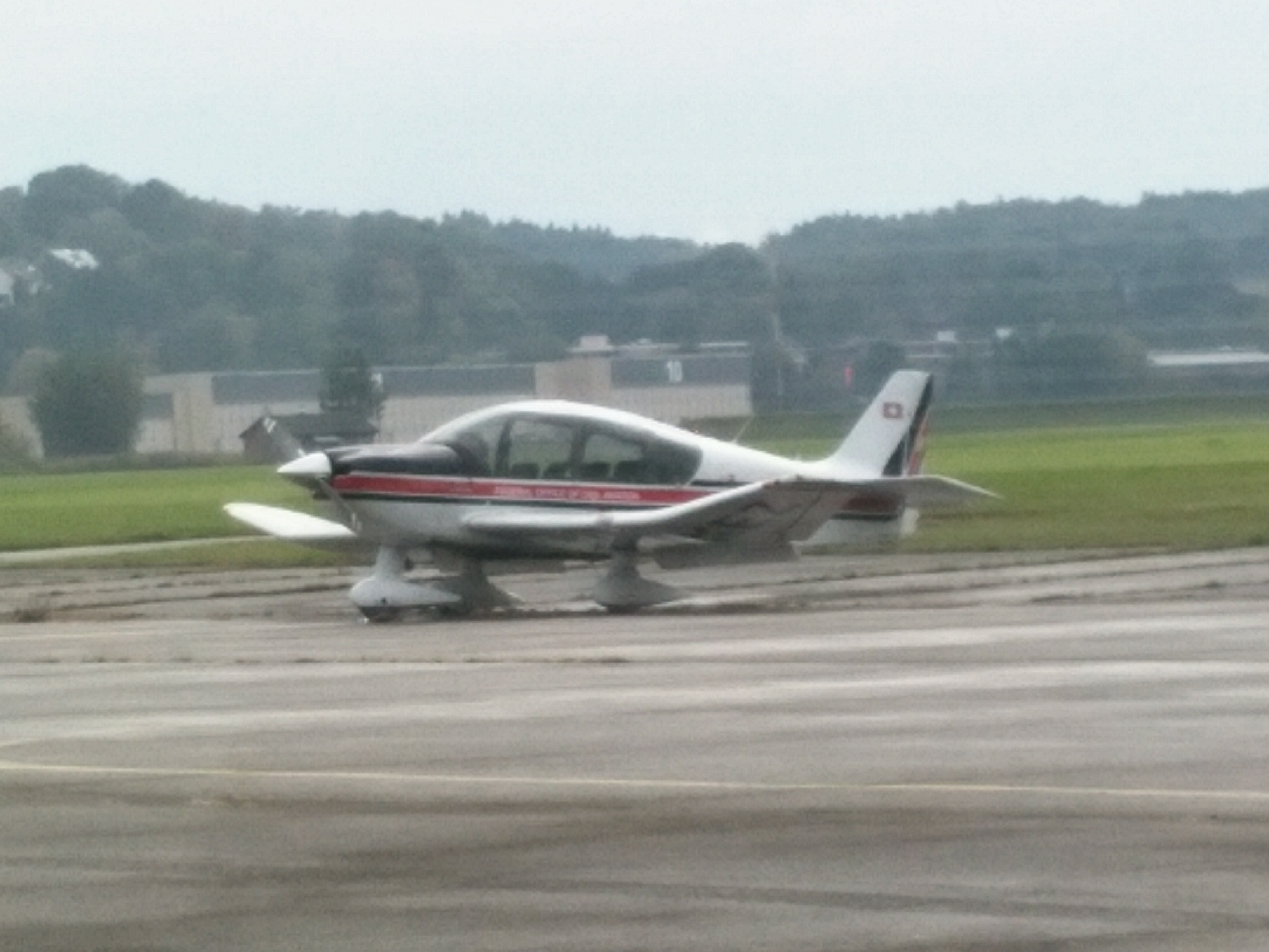 HB-KEZ ROBIN DR 400/500 Flugzeug des BAZL in LSMD